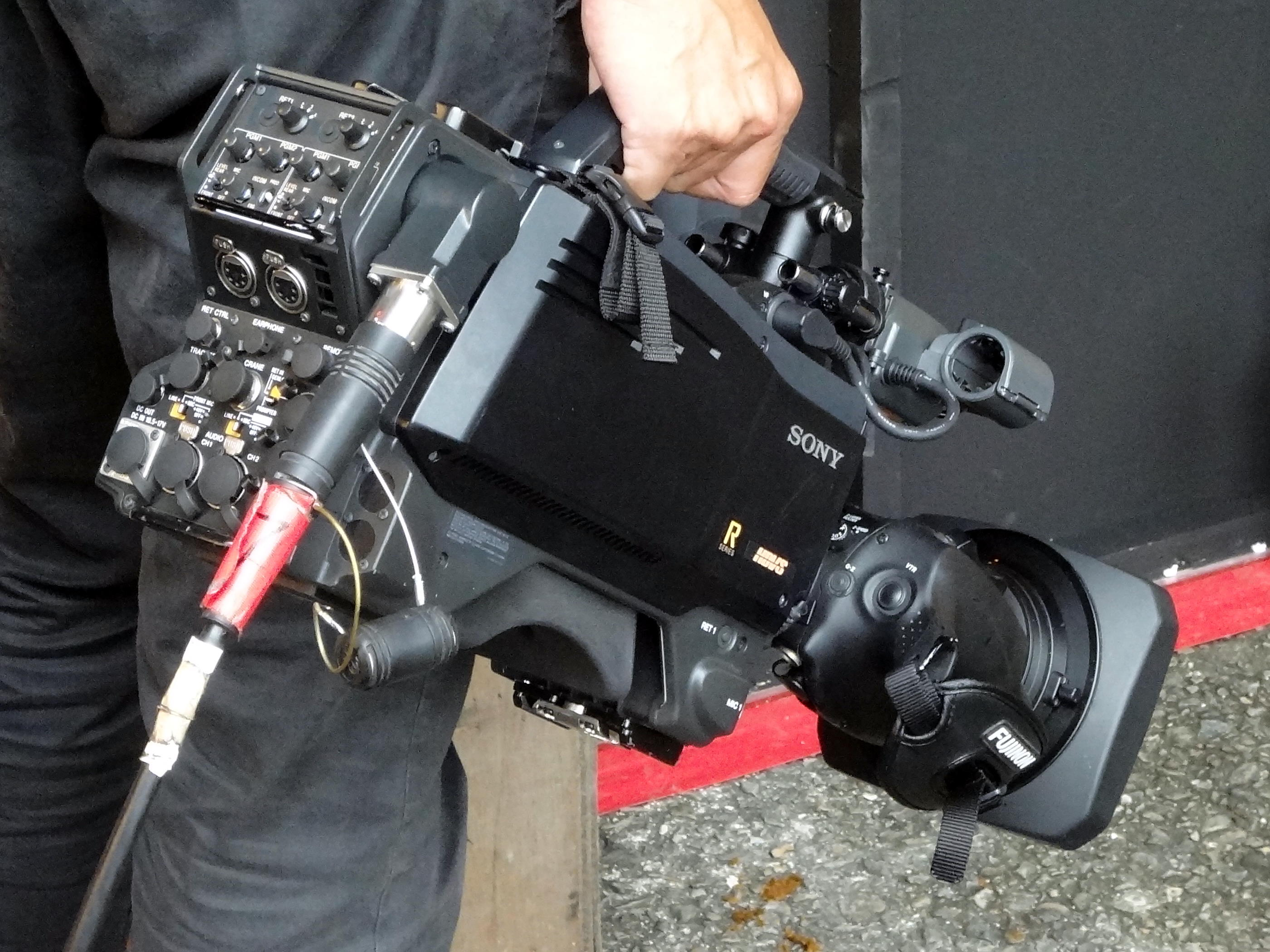 中文（台灣）: 第55屆金馬獎星光大道，臺灣電視公司戶外轉播用Sony攝影機7號。